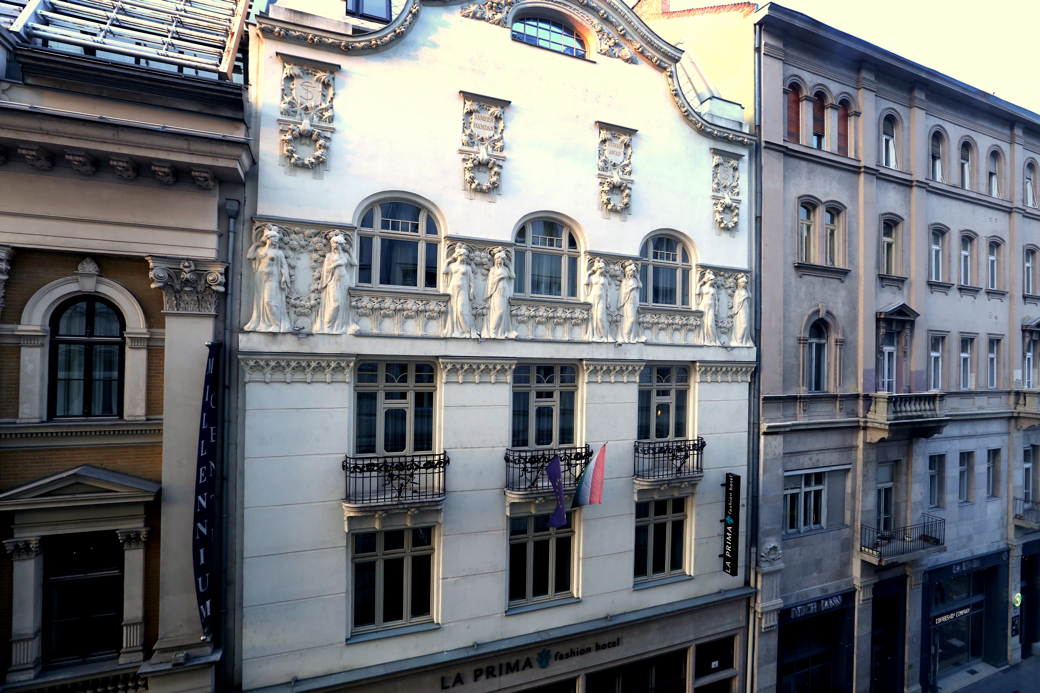 Staffenberg-ház. - La Prima Fashion Hotel Budapest. - Budapest, Piarista u. 6